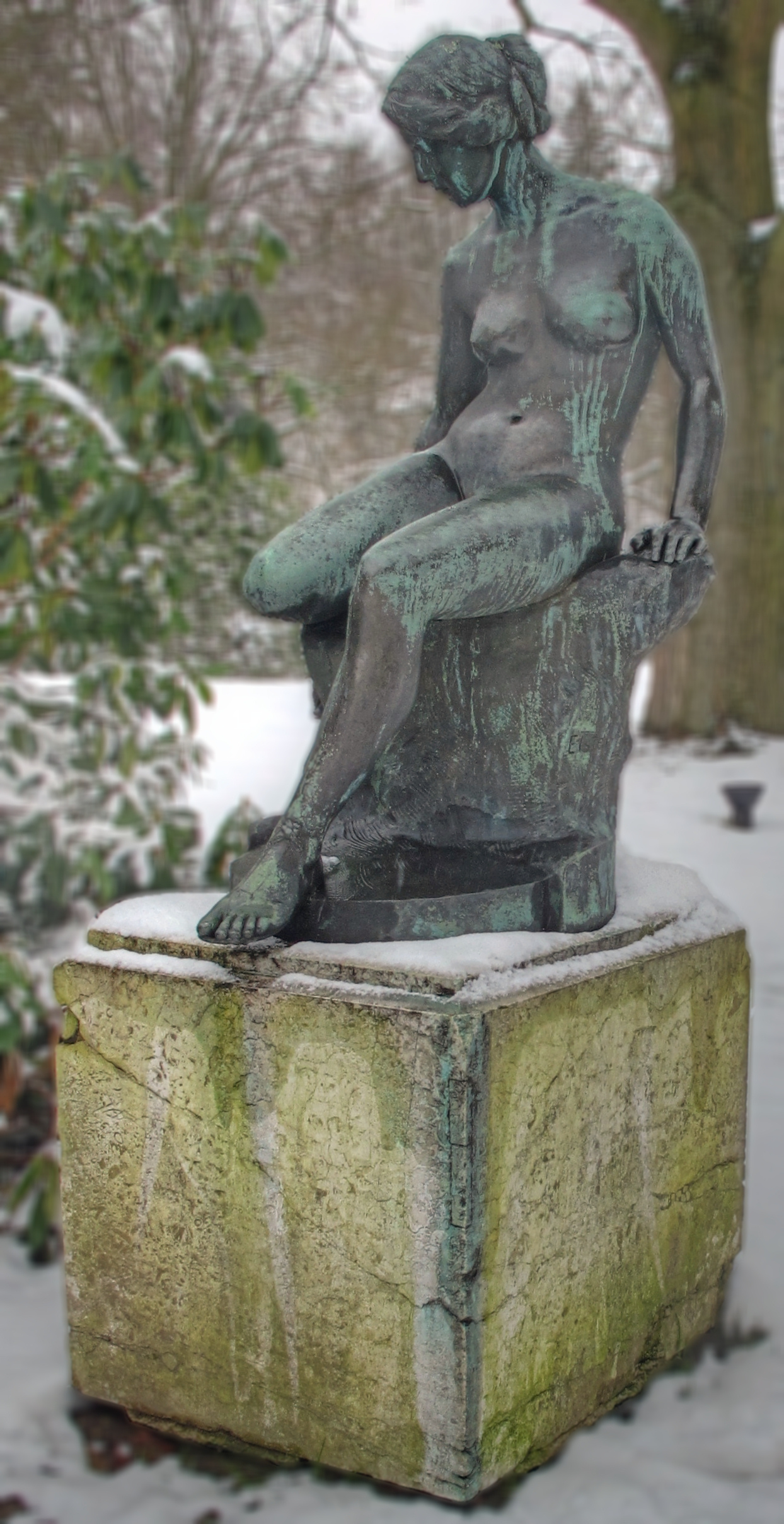 Deutschland, Sachsen, Vogtland, Bad Brambach, Kurpark, lebensgroße Plastik